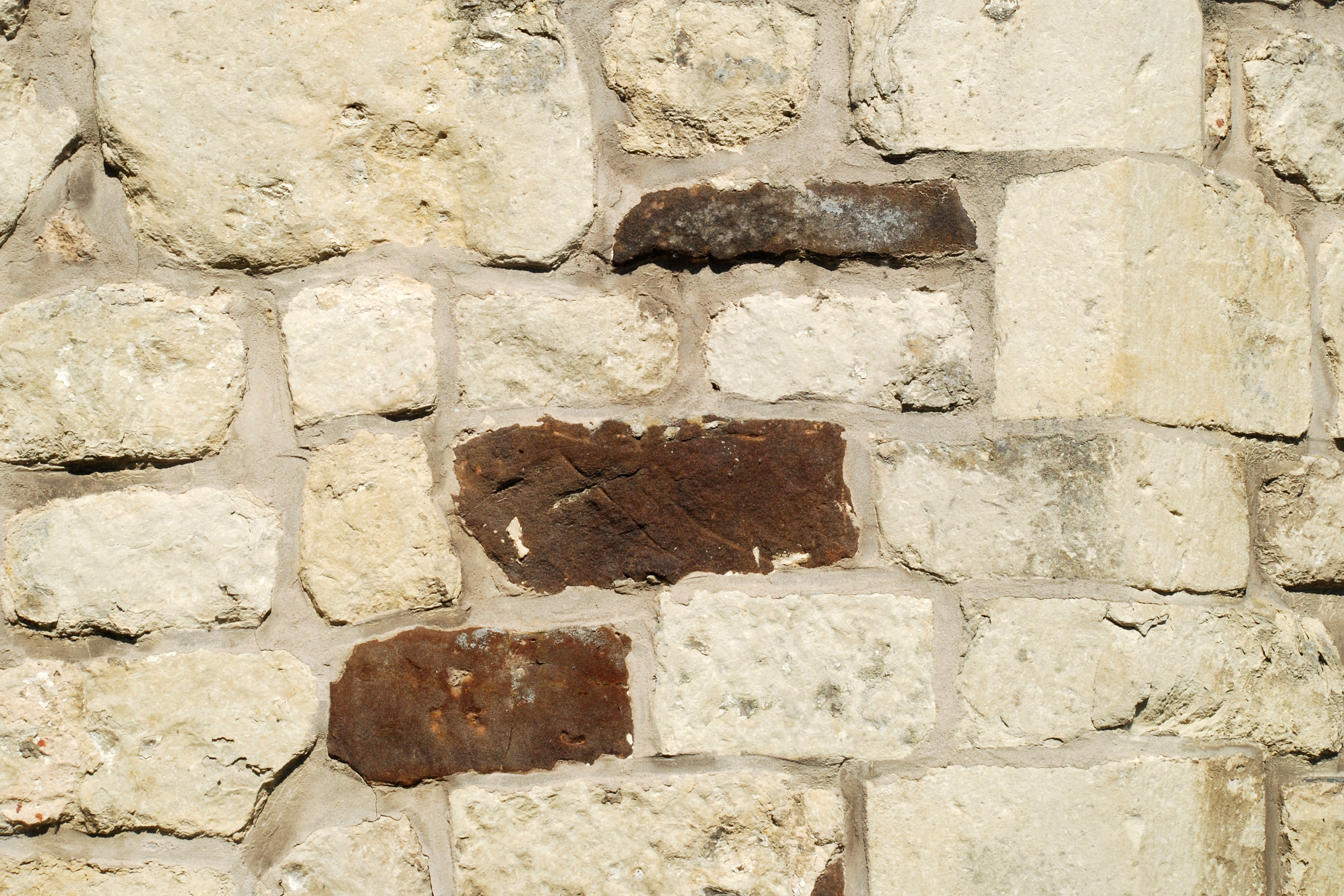 Belgique - Brabant Wallon - Lasne - Église Saint-Étienne d'Ohain